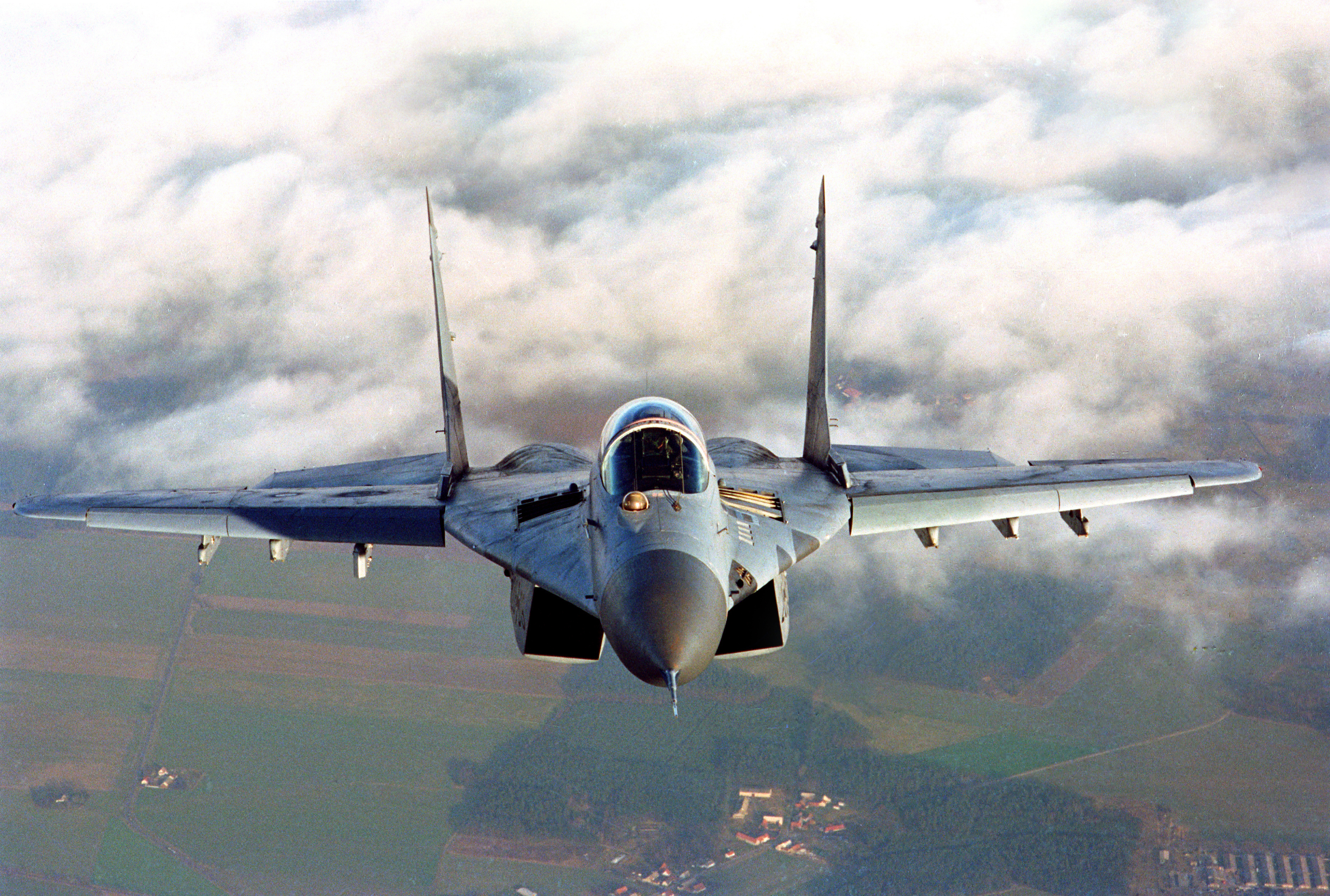 Frontansicht einer Mig 29 Fulcrum im Flug. Das in der Sowjetunion entwickelte und gefertigte Flugzeug wurde ab 1988 an die Landstreitkräfte der ehemaligen DDR geliefert. Die Luftwaffe übernahm 1990 zwanzig Einsitzer und vier Zweisitzer der ehemaligen NVA. Leicht modifiziert (Navigationsanlage, Gps.IFF-System) wurde sie auch im NATO Luftraum eingesetzt. Die Mig 29 wurde 2003 an die Polnischen Streitkräfte übergeben. ©Bundeswehr/PizLuftwaffe